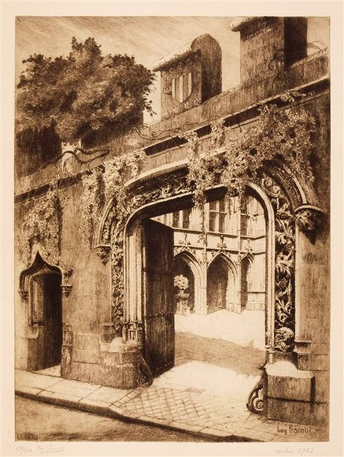 carte postale ancienne représentant le portail de l’Hôtel de Cluny